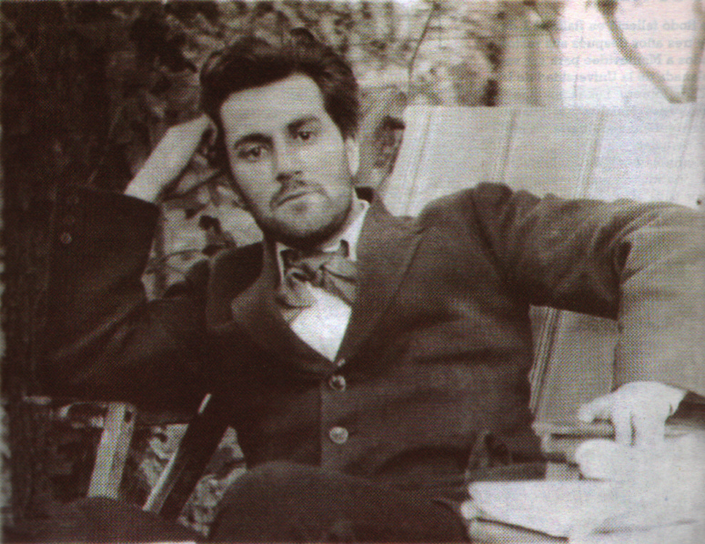 Fotografía de Washington Beltrán Barbat (1885 - 1920), político y abogado uruguayo.